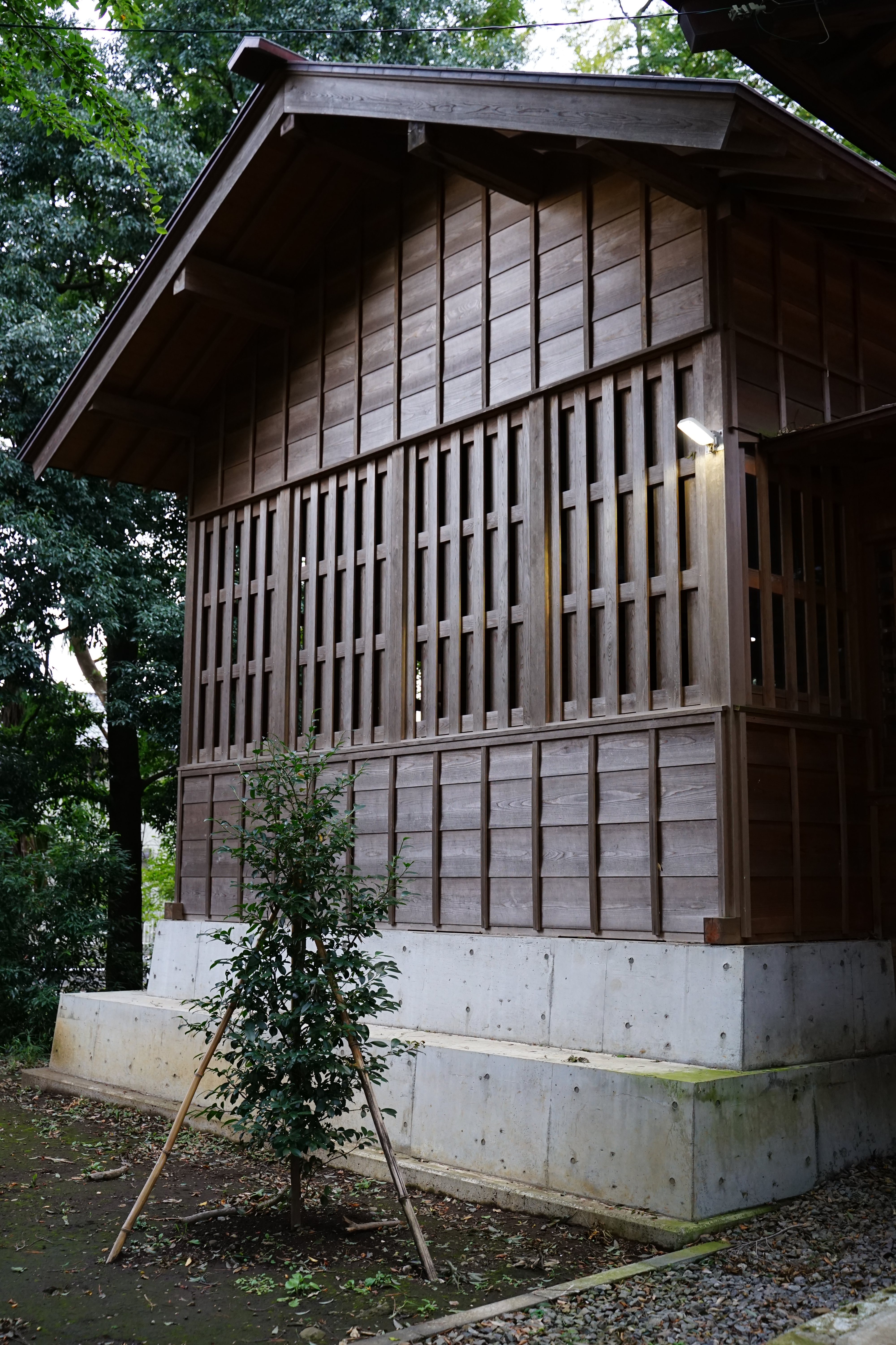 東京都調布市 虎狛神社の本殿